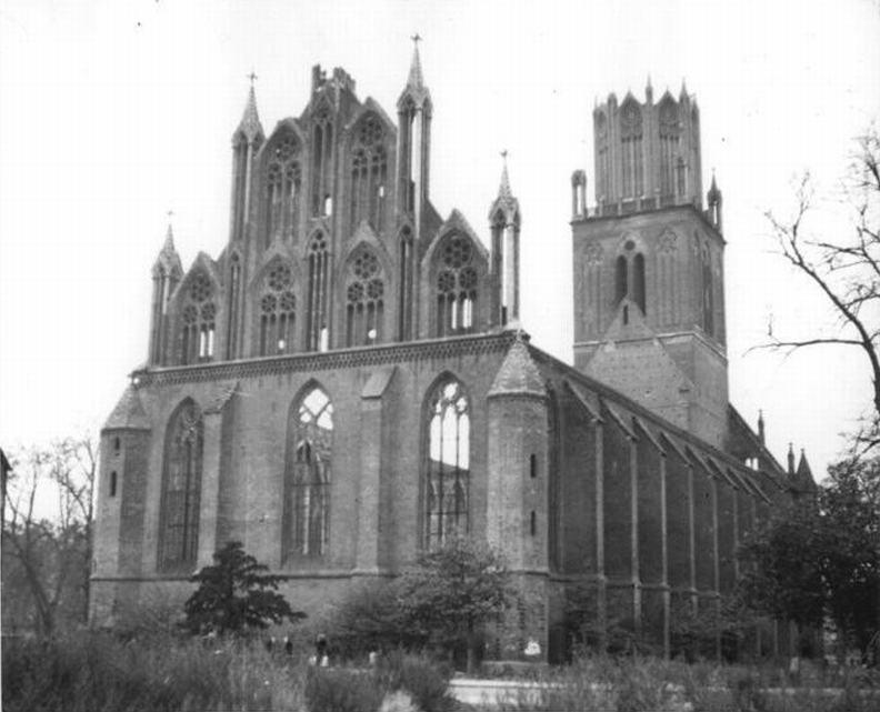 Zentralbild Klein 12.11.1952 Alte gotische Bauten in Neubrandenburg. UBz: Der Giebel der im zweiten Kriege zerstörten Marienkirche.